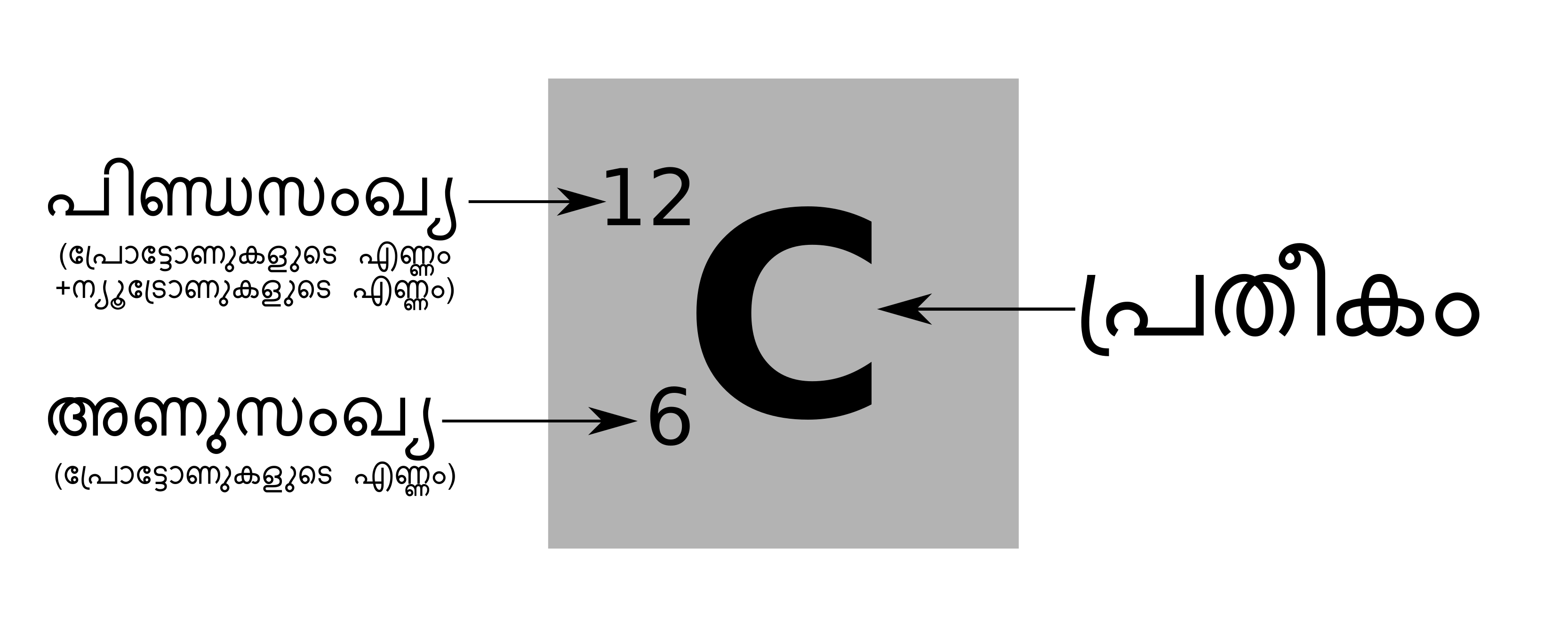 മൂലകത്തിന്റെ പ്രതീകം, അണുസംഖ്യ, പിണ്ഡസംഖ്യ എന്നിവ രേഖപ്പെടുത്തുന്ന രീതി